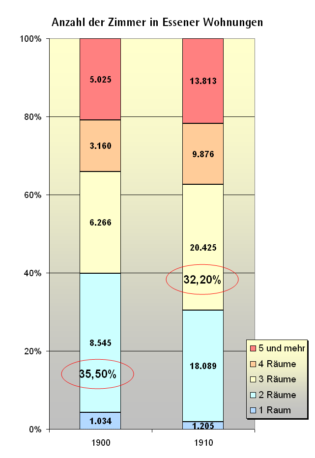 Anzahl der Zimmer in Essener Wohnungen 1900 und 1910 im Vergleich